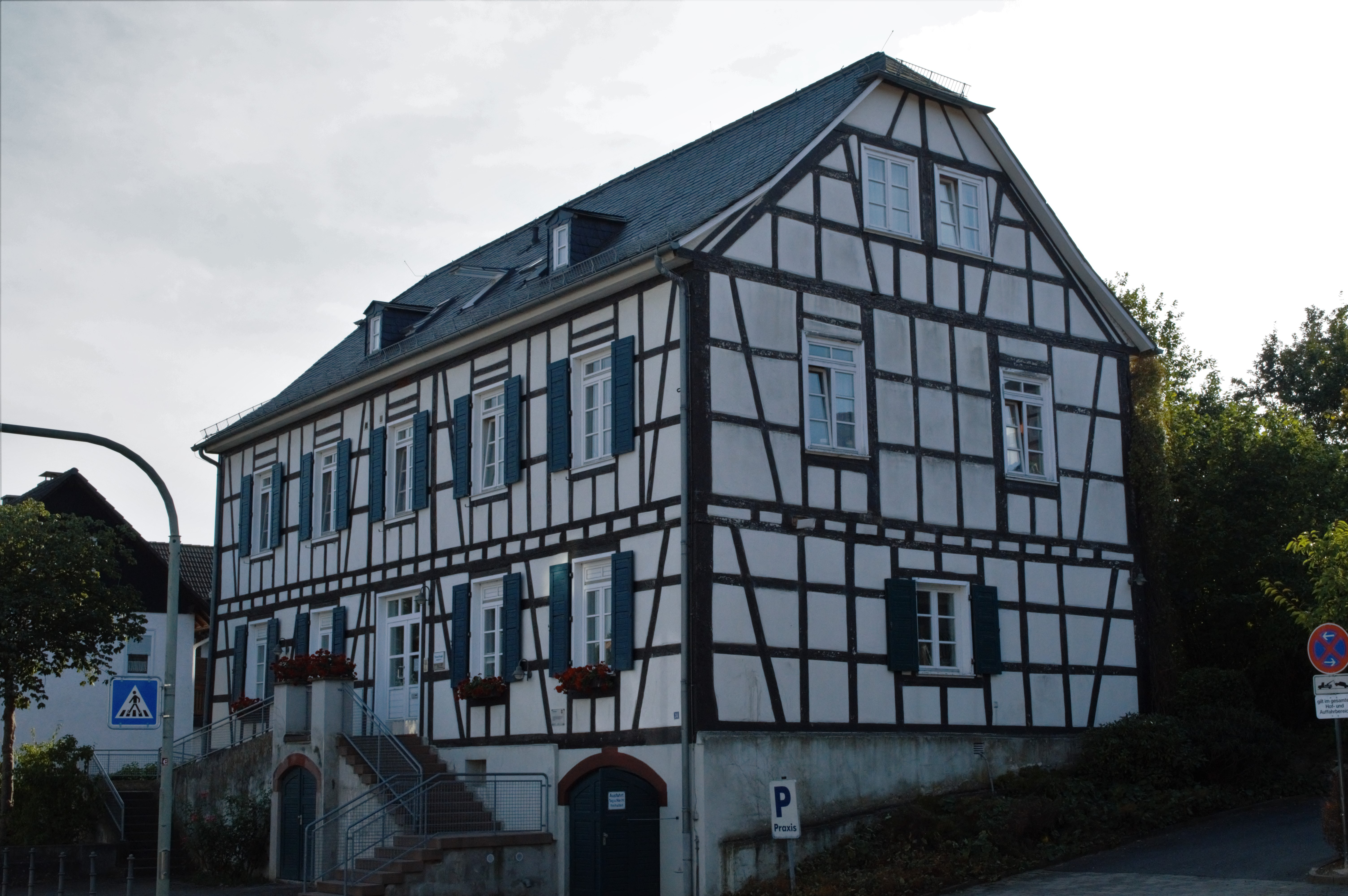 Alte Schule in Eschbach (Usinger Straße 38)